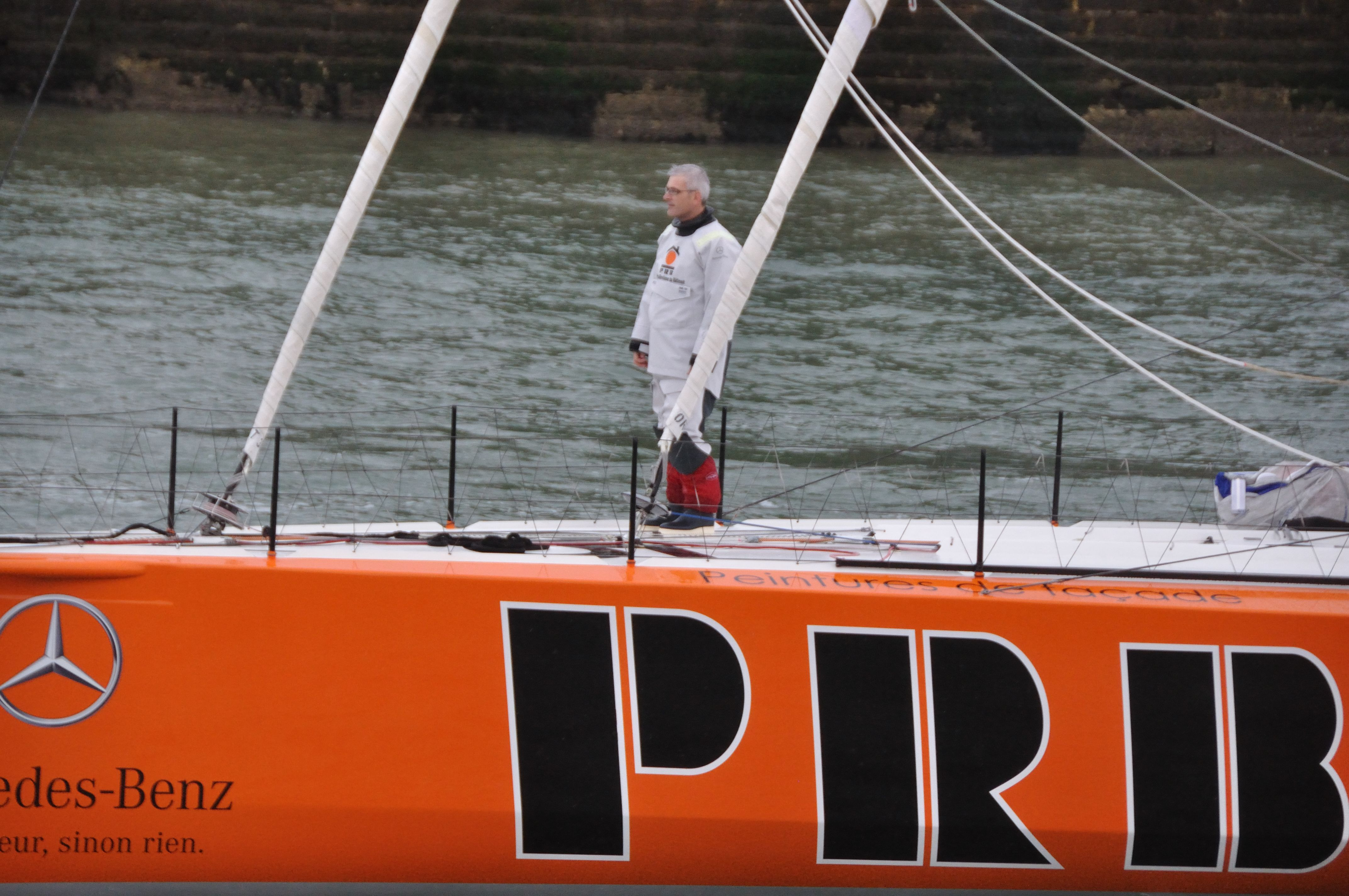 Vendée Globe 2012-2013 : Vincent Riou sur PRB au départ des Sables d'Olonne